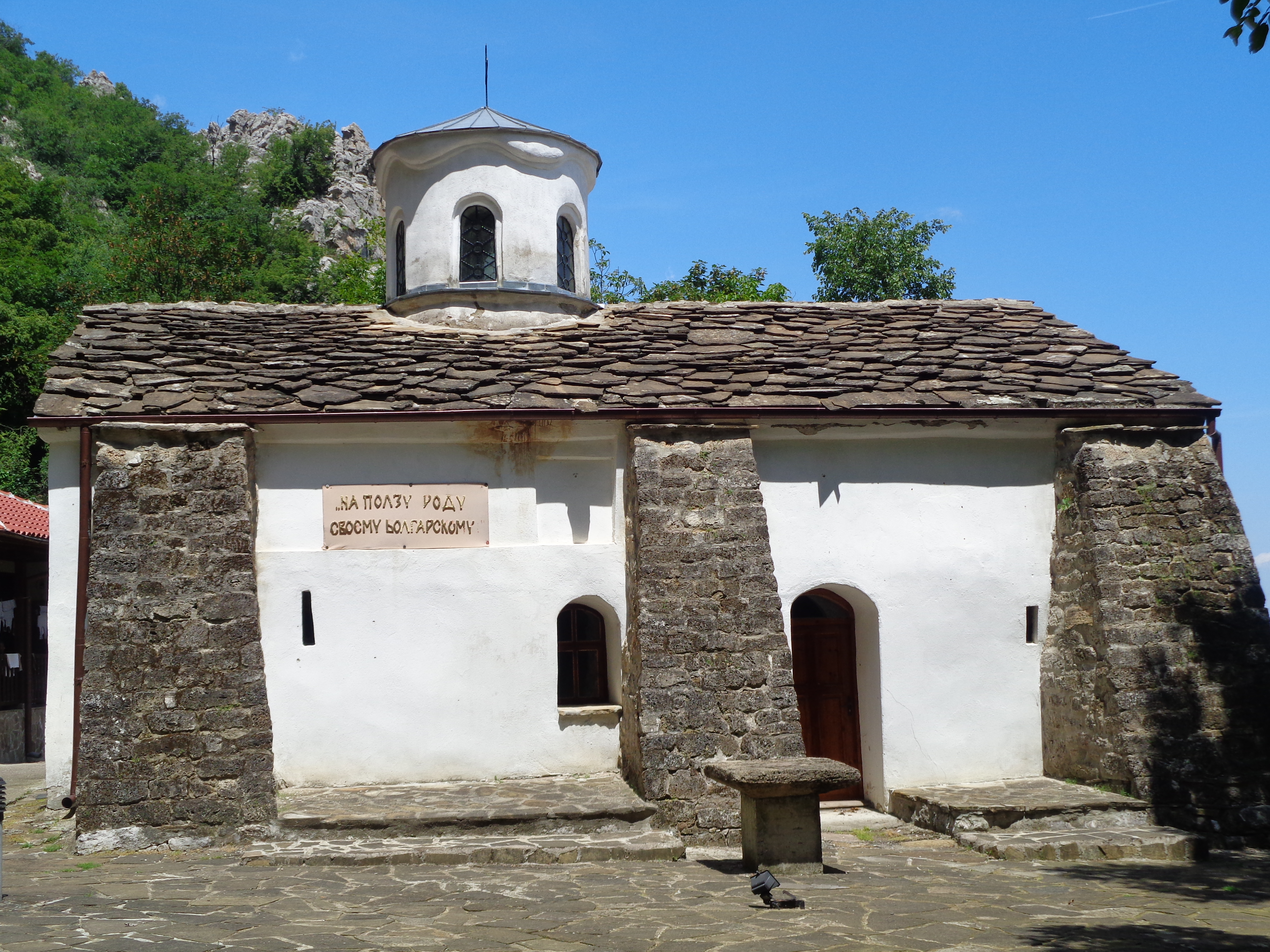 Врачански Балкан